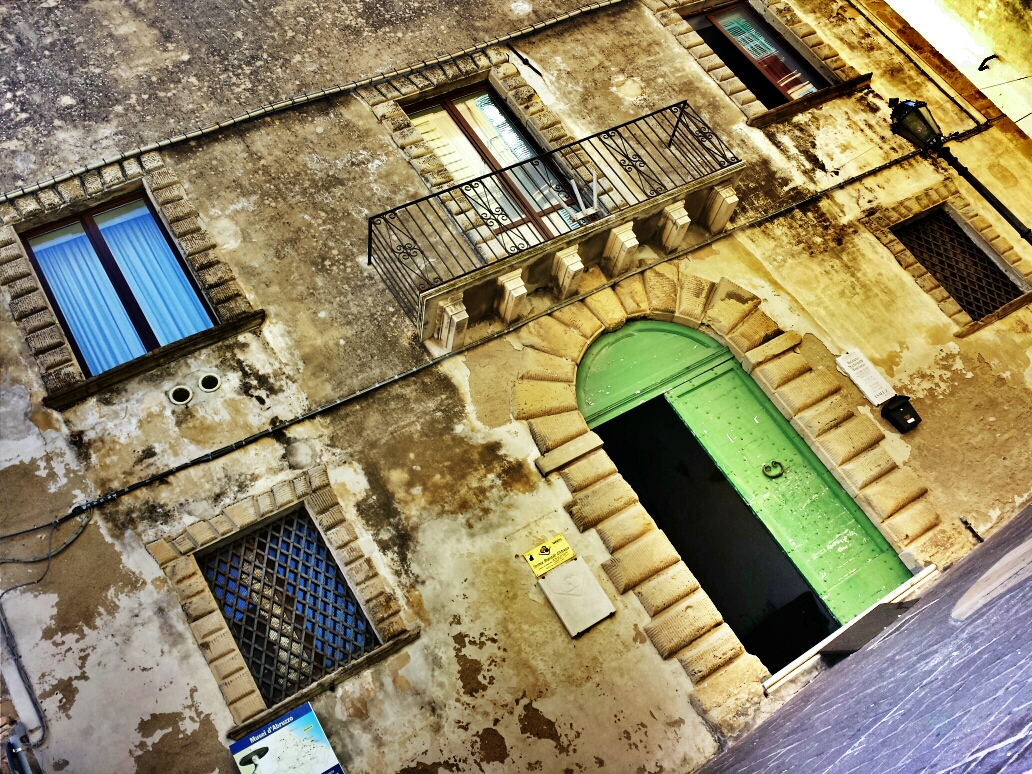 Esterni del palazzo Corvo, edificio che oggi ospita il Museo Nazionale d'Abruzzo - Archivio Francesco Tosti. Ortona (CH) 2013